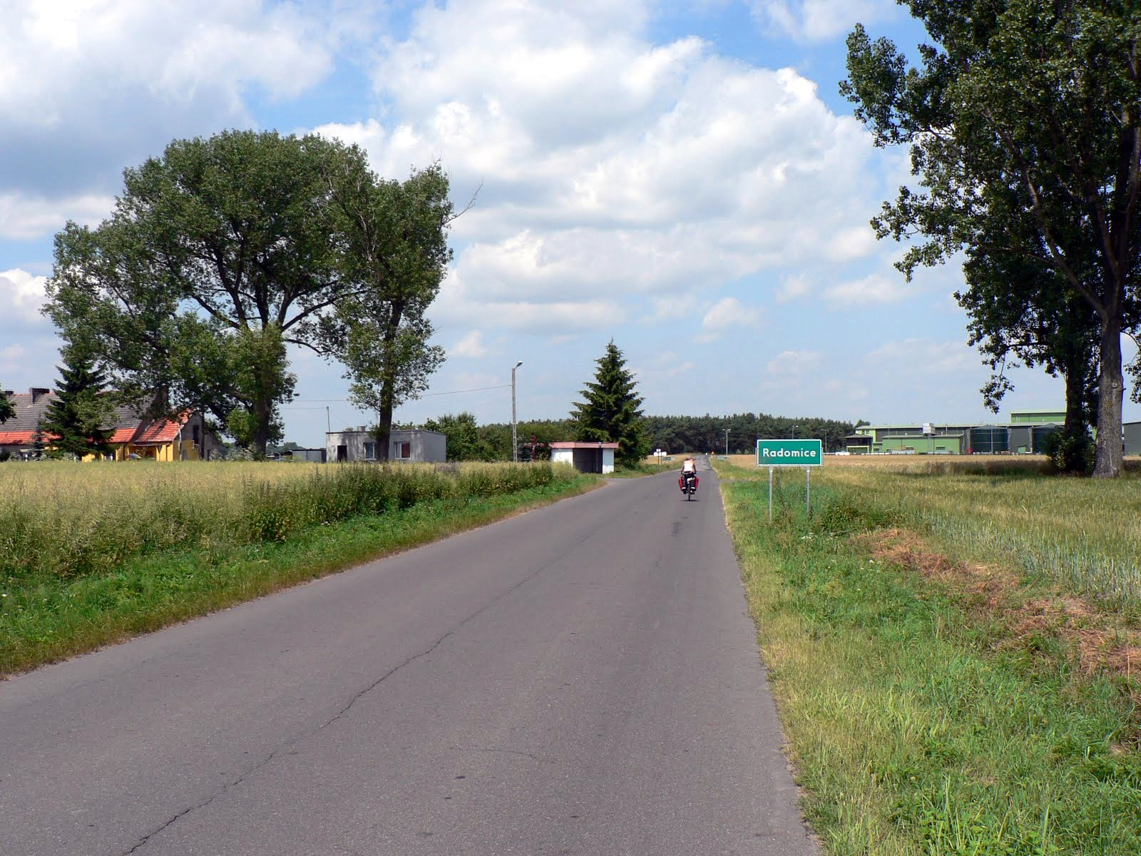 Radomice k. Wrześni